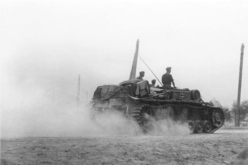 Russland, Kampf um Stalingrad, Sturmgeschütz An der Sowjetfront: Kampf um Stalingrad.- Die ersten Sturmgeschütze dringen in das hartumkämpfte Stalingrad ein. PK-Aufnahme: Kriegsberichter Gebauer (Sch) 5263-42 "Fr. Fr. OKW" September 1942 [Herausgabedatum] [Sowjetunion.- Schlacht um Stalingrad]